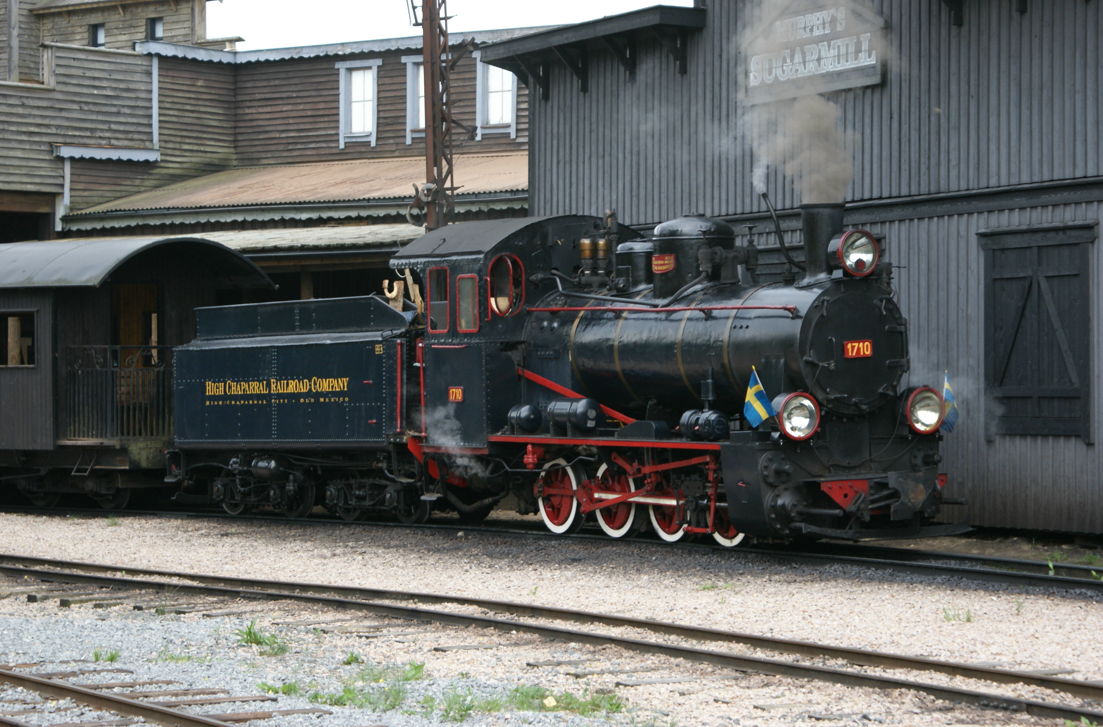 Ångloket 1710 fd Px 29-1710 fd Wp 29-1732 Warszawa 244/1930 i High Chapparal 30.07.2009